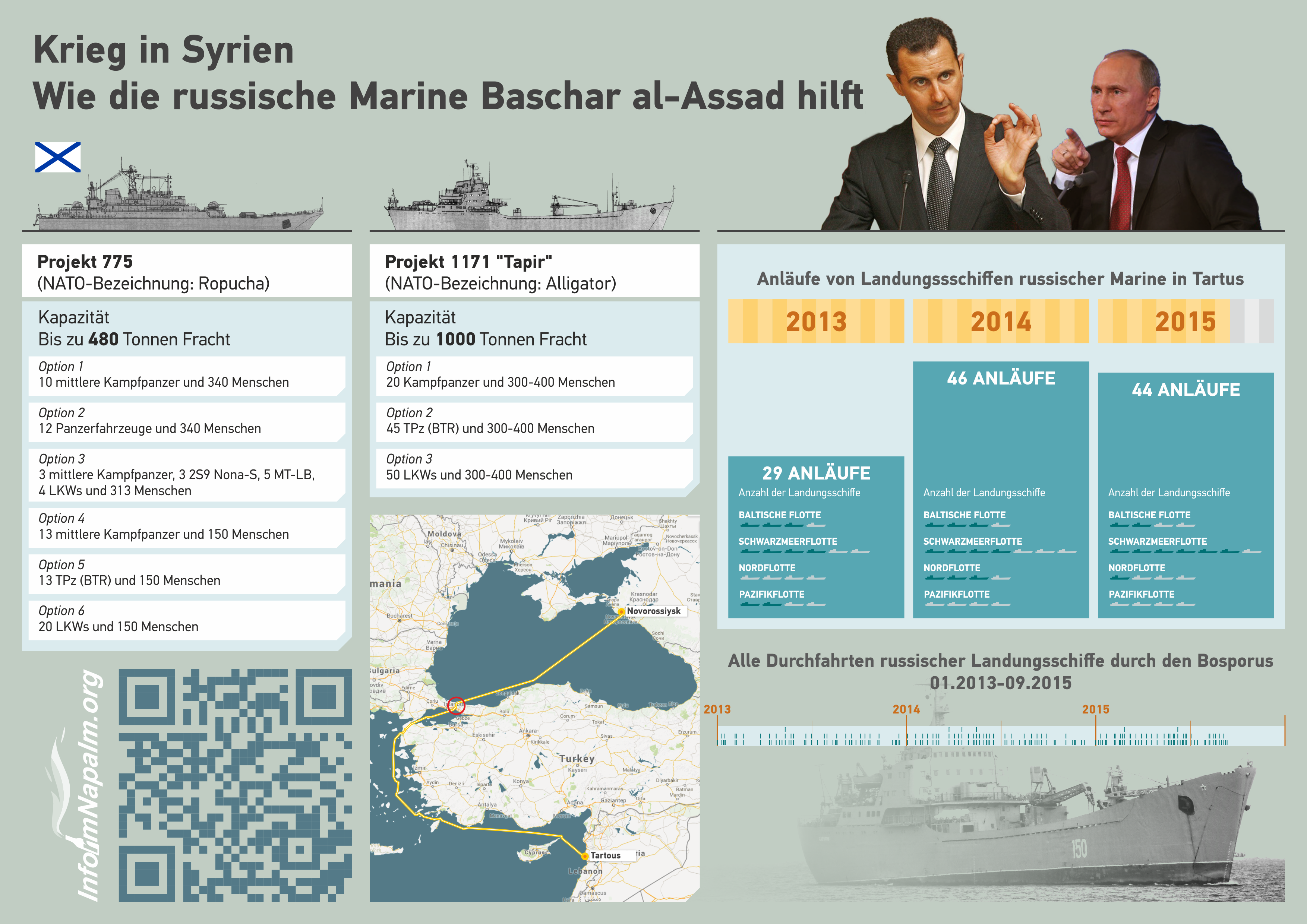 Krieg in Syrien. Wie die russische Marine Baschar al-Assad hilft